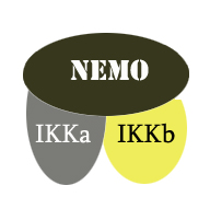 proteine nemo